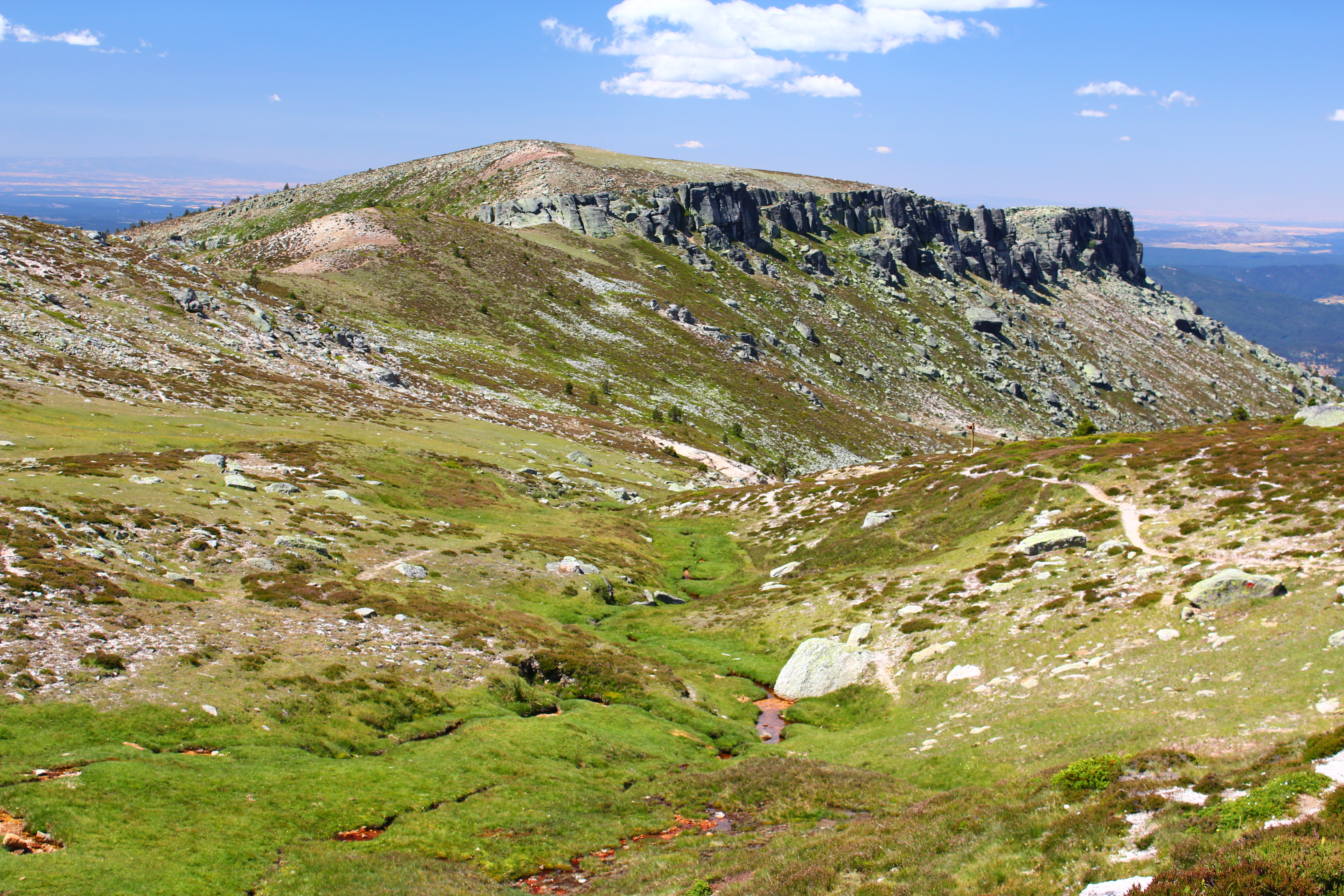 Sierras de Urbión y Cebollera This is a photography of a Special Area of Conservation in Spain with the ID: ES4170116. Natura2000 entry, EEA entry